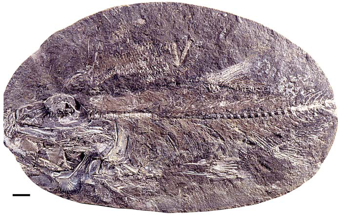 †Varasichthys ariasi Arratia en vista lateral. Oxfordiano de Quebrada del Profeta, Cordillera de Domeyko, Norte de Chile. Escalas = 1 cm.